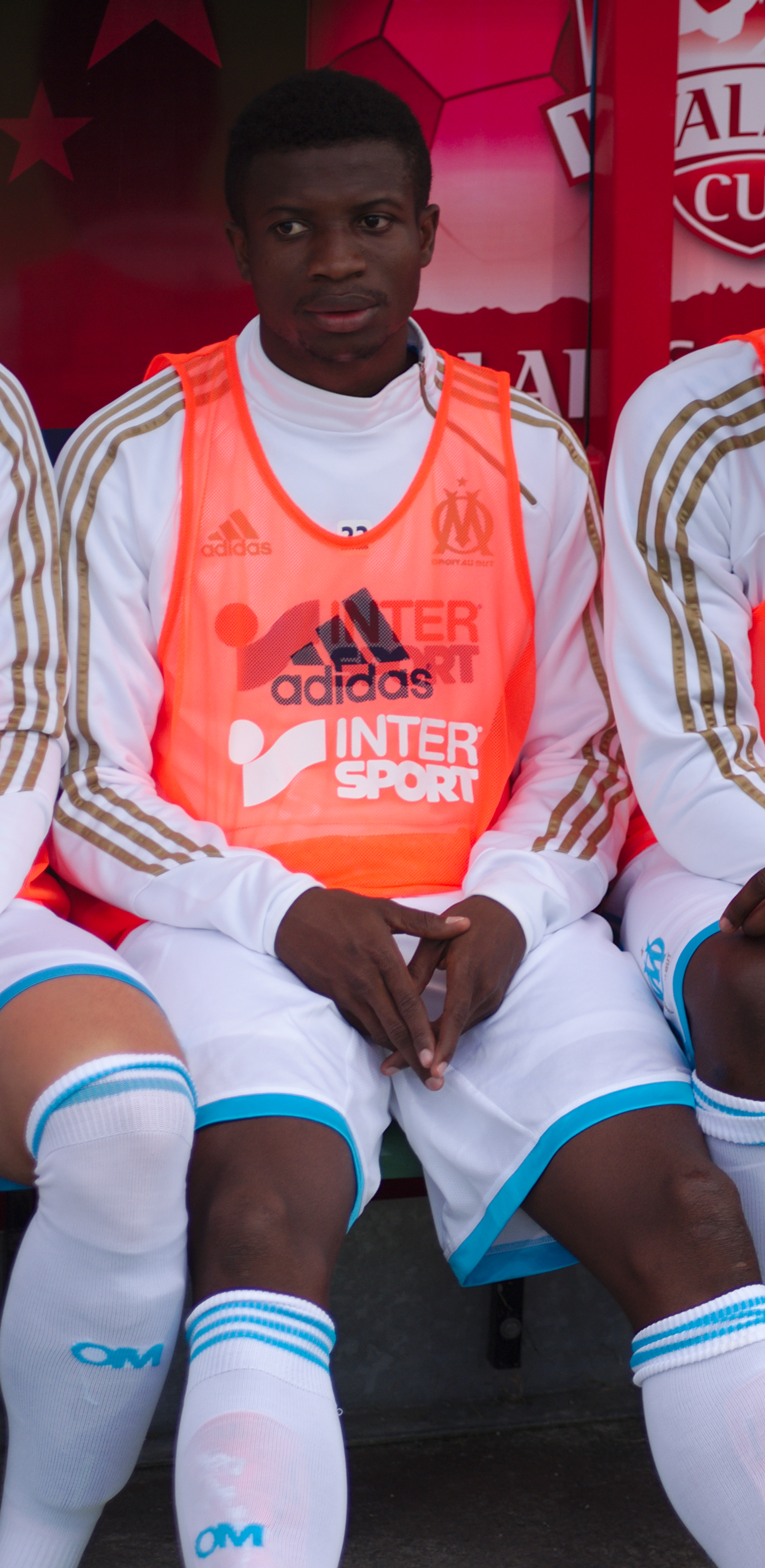 Valais Cup 2013 - OM-FC Porto - 20130713 - Senah Mango